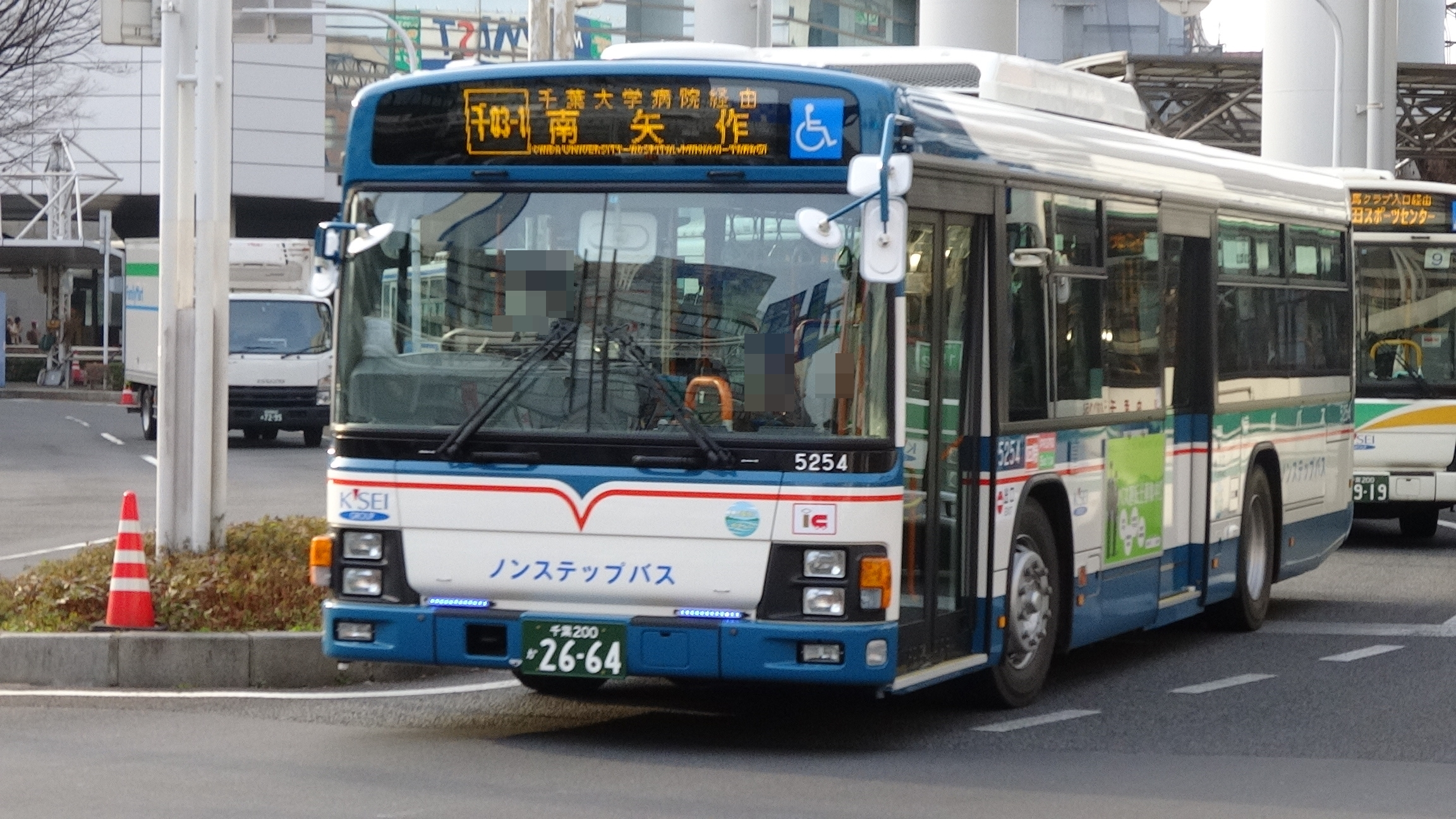 2015年1月26日、JR千葉駅東口にて